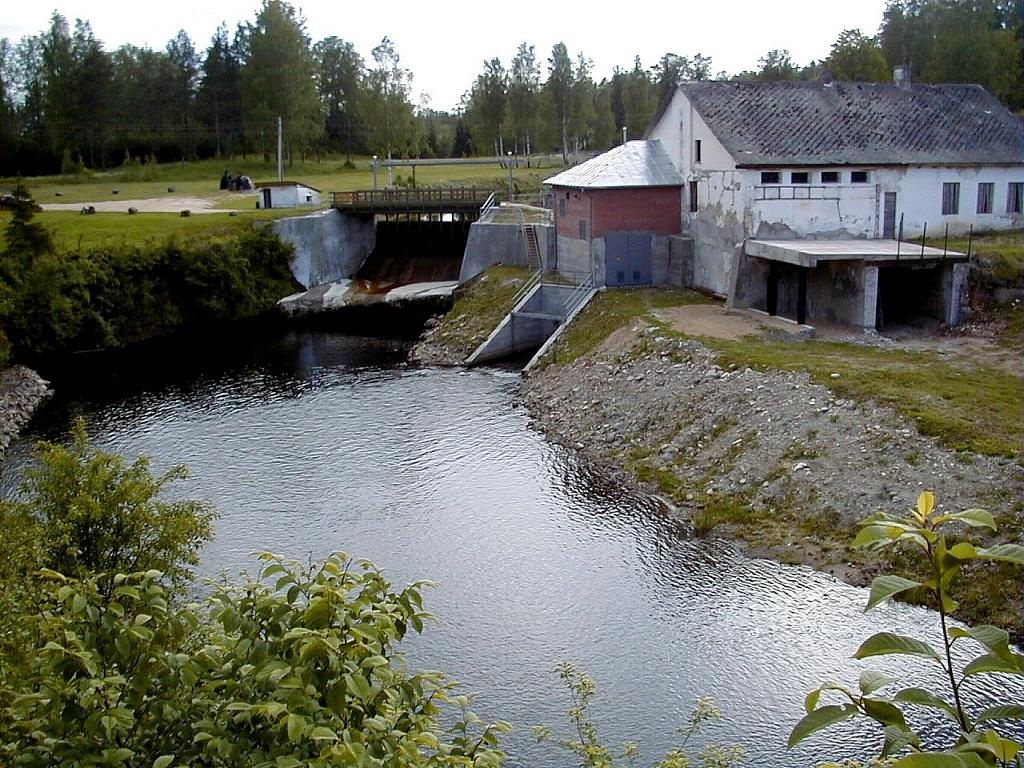 Vaidava pie Grūbes dzirnavām 2001-06-16